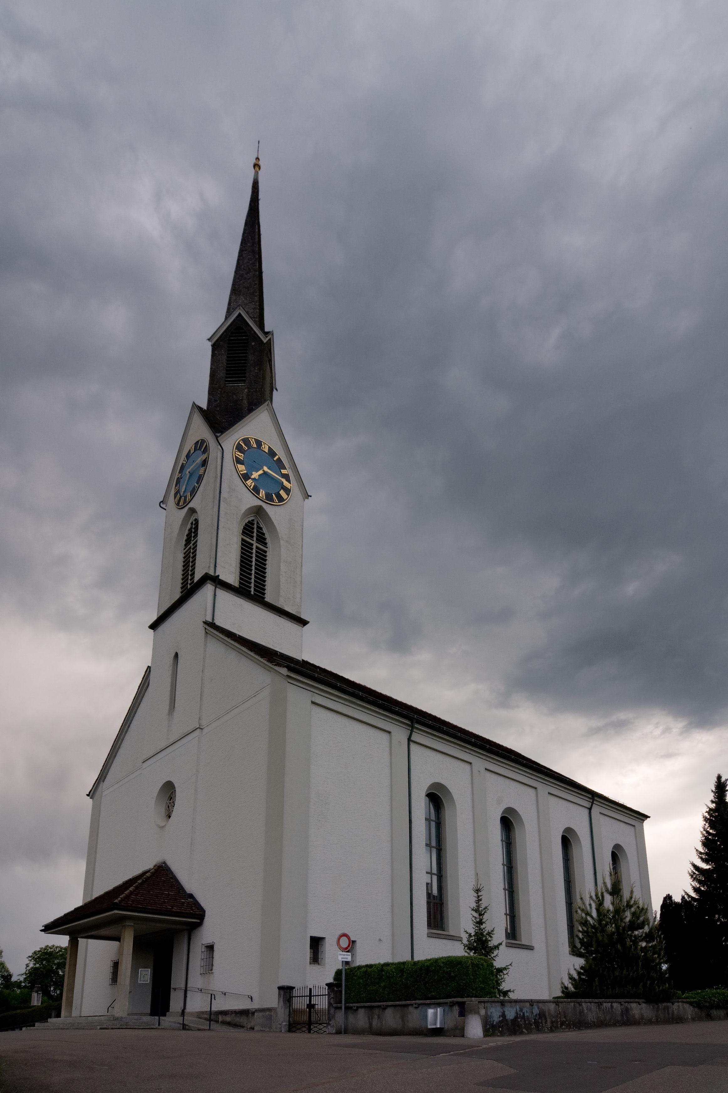 Die Kirche Obfelden von unten gesehenArchitekt Ferdinand Stadler